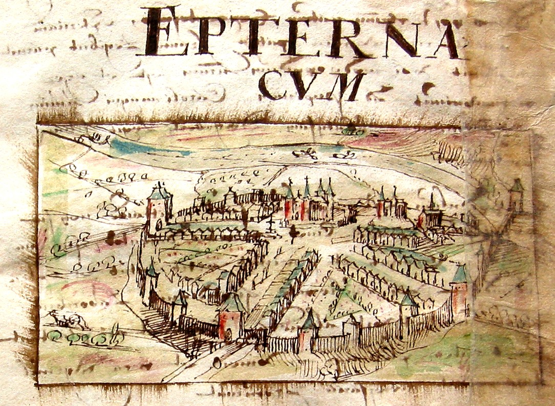 De eerste tekening, van de stad Echternacht, die zich in het cartutalium van Jean Berltels bevindt. Het cartularium bevindt zich in het archief van de Abdij Echternach en bevindt zich de Archives Nationales in Luxembourg.